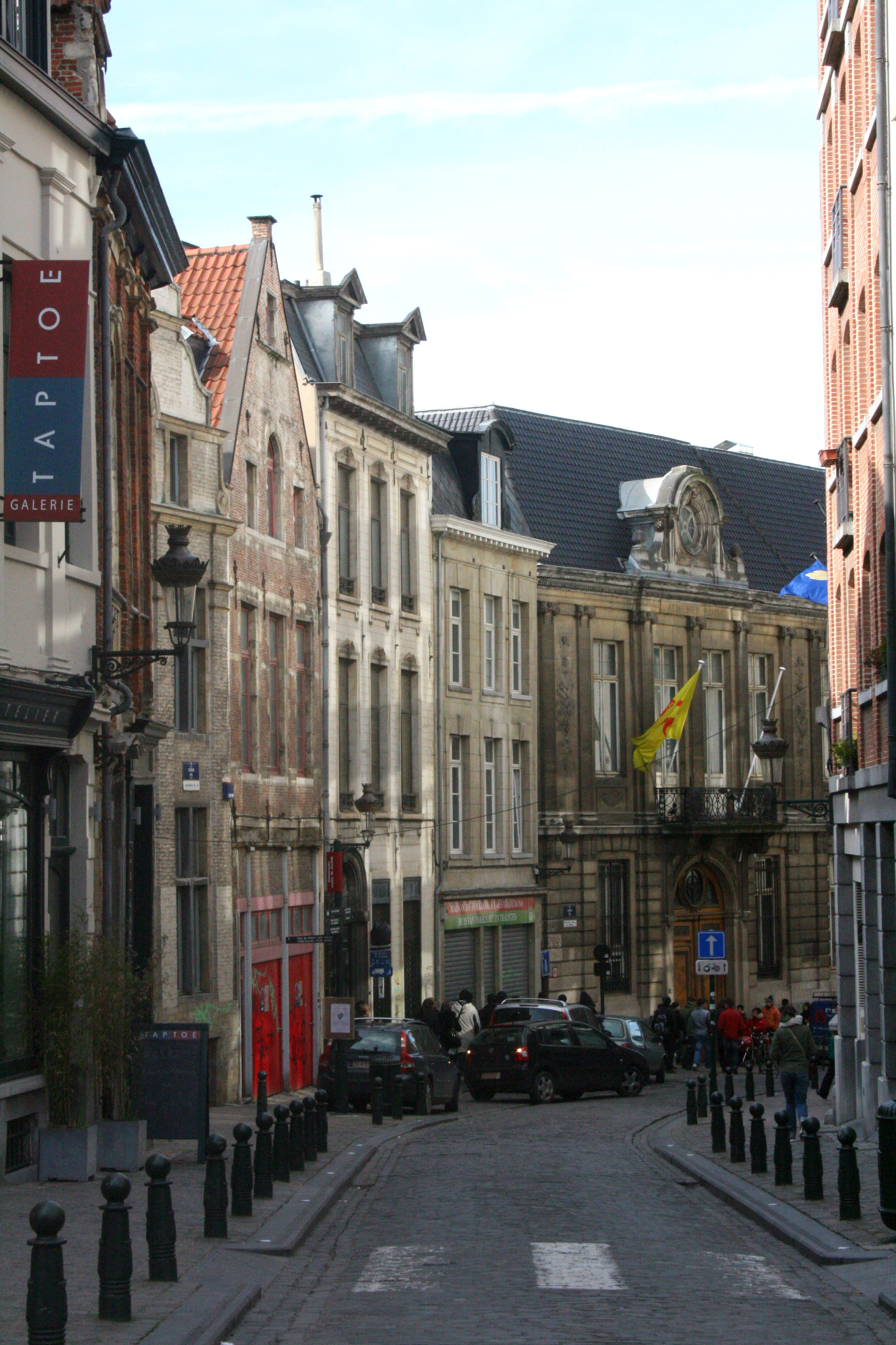 Rue du chêne, Bruxelles (Belgique)